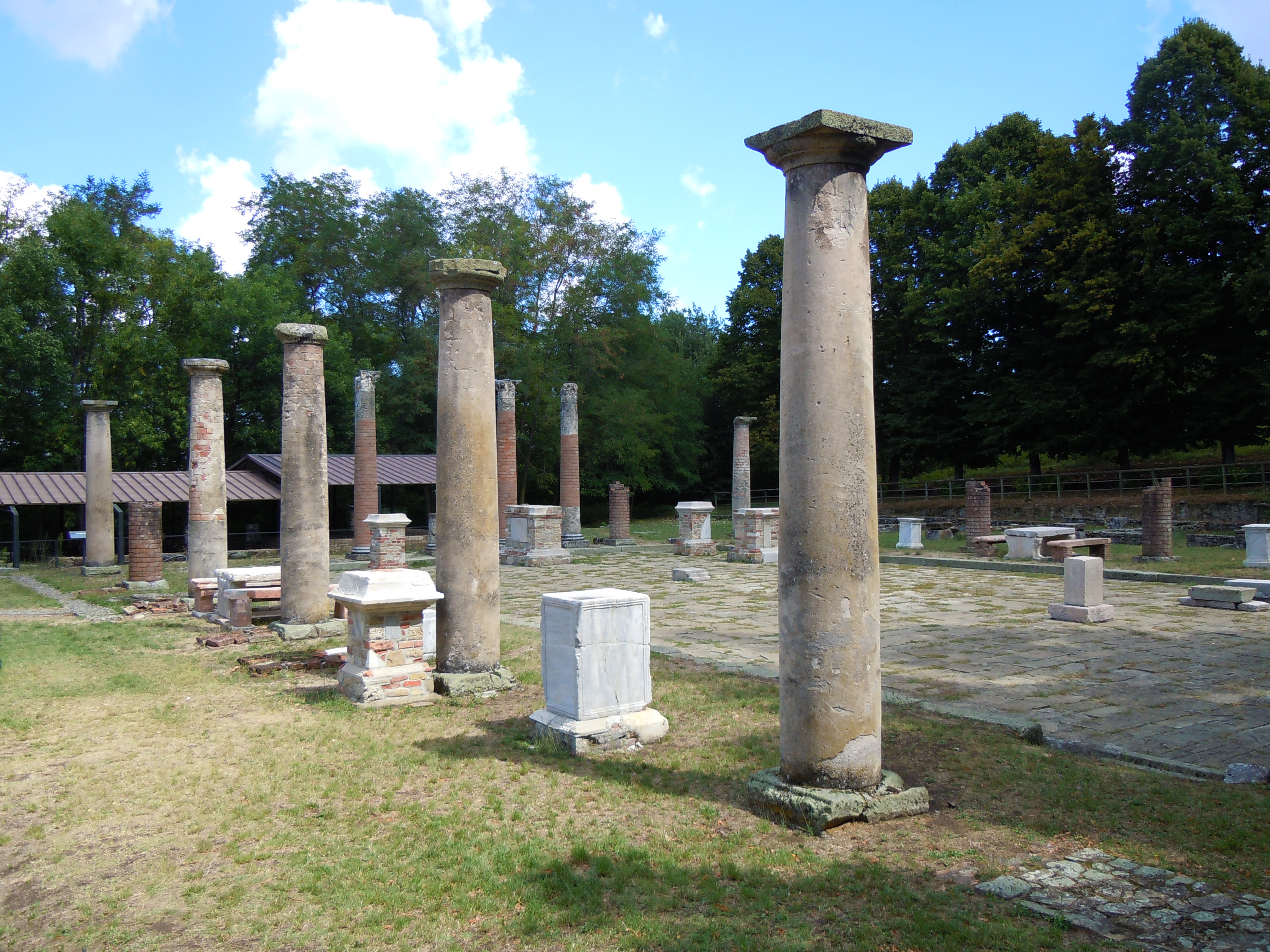 Area archeologica e Antiquarium di Veleia - MIBAC This is a photo of a monument which is part of cultural heritage of Italy.